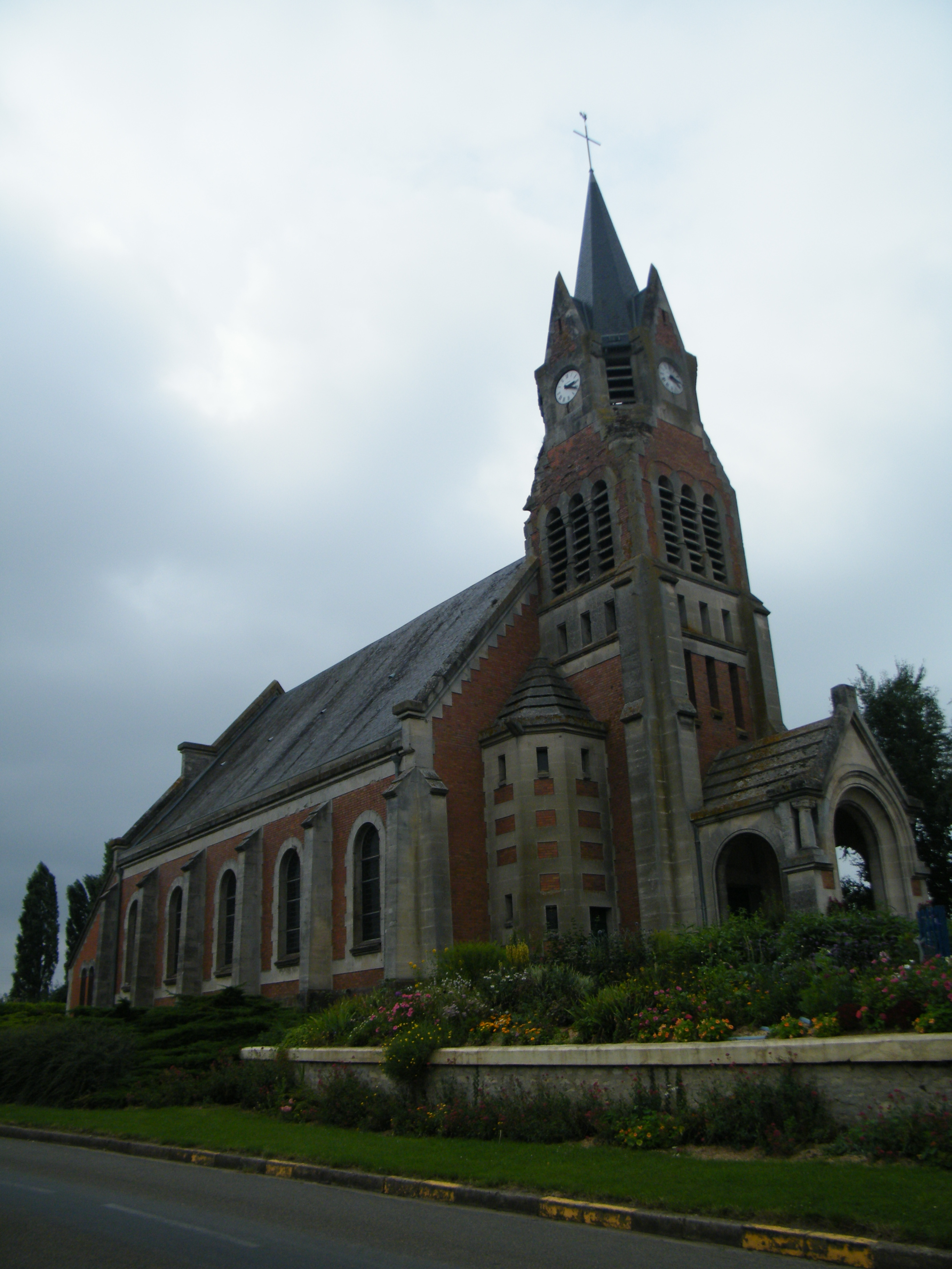 église